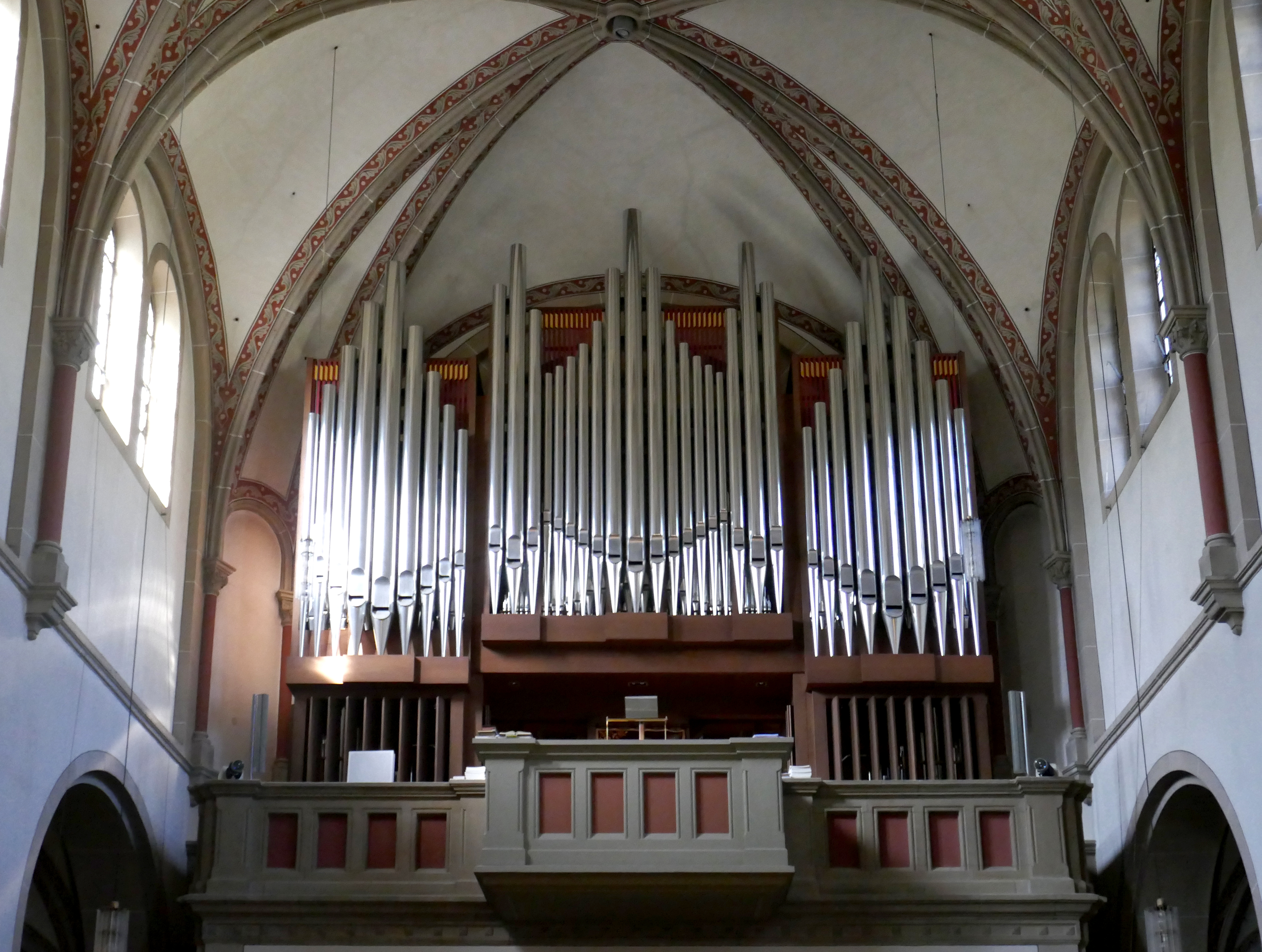 St. Nikolaus, Köln-Sülz - Mühleisen-Orgel von 2009. This is a photograph of an architectural monument.